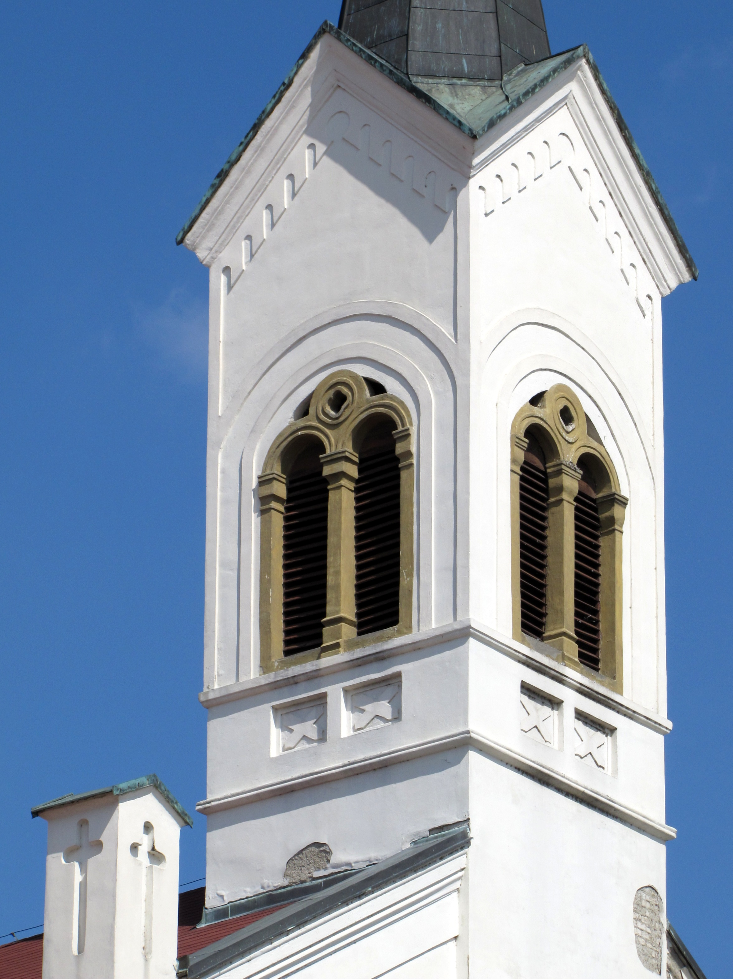 Kaple sv. Josefa Kalasanského v Kyjově – neorománské okno na věži